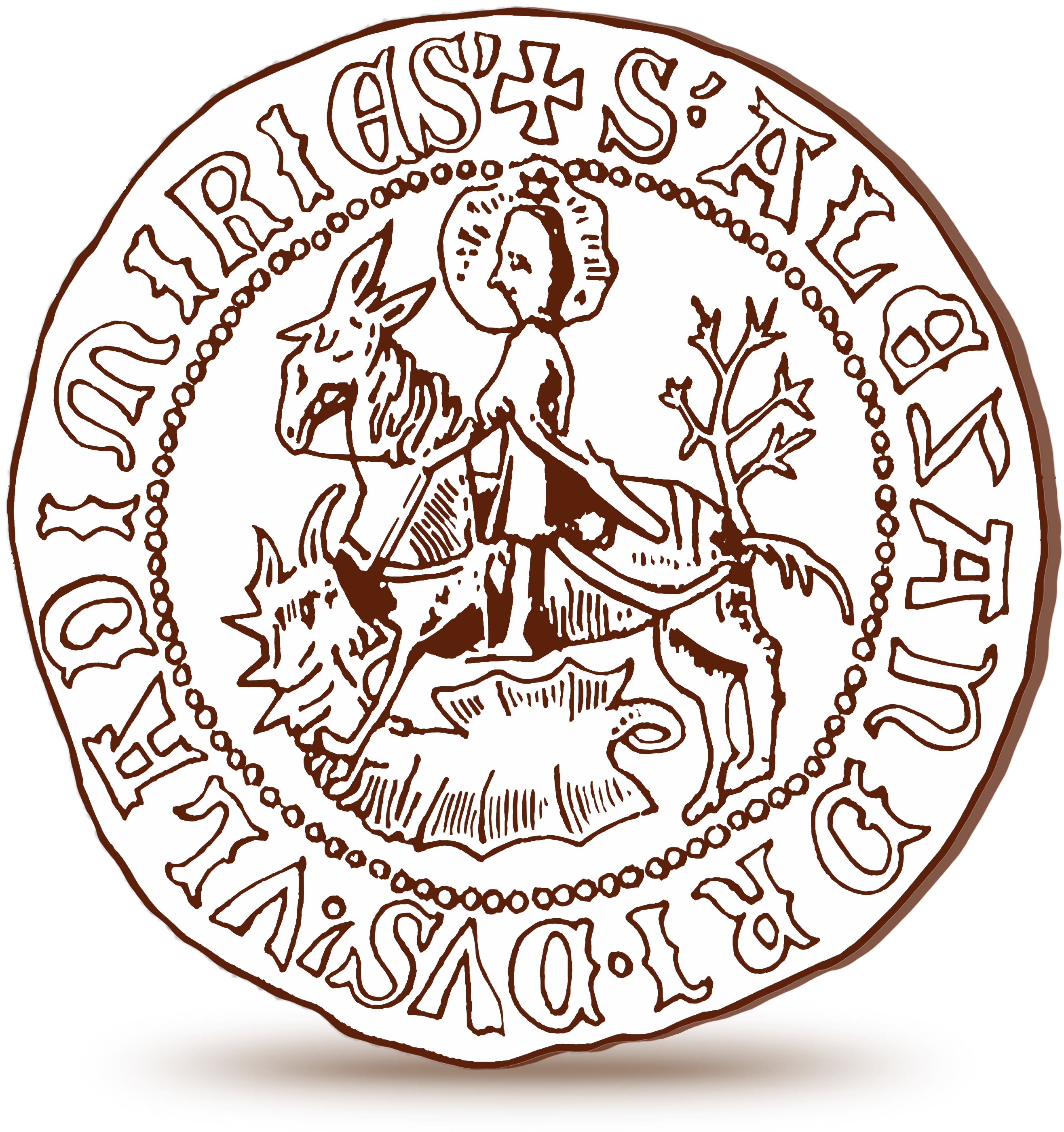 Печать Александра, сына Кориата. 1375 г. Легенда на латинском: «S•ALEZANDRI•DVS•VLADIMIRIES» – Печать Александра, князя Владимирскиого (Волынского). Прорись по А. Б. Лакиеру.